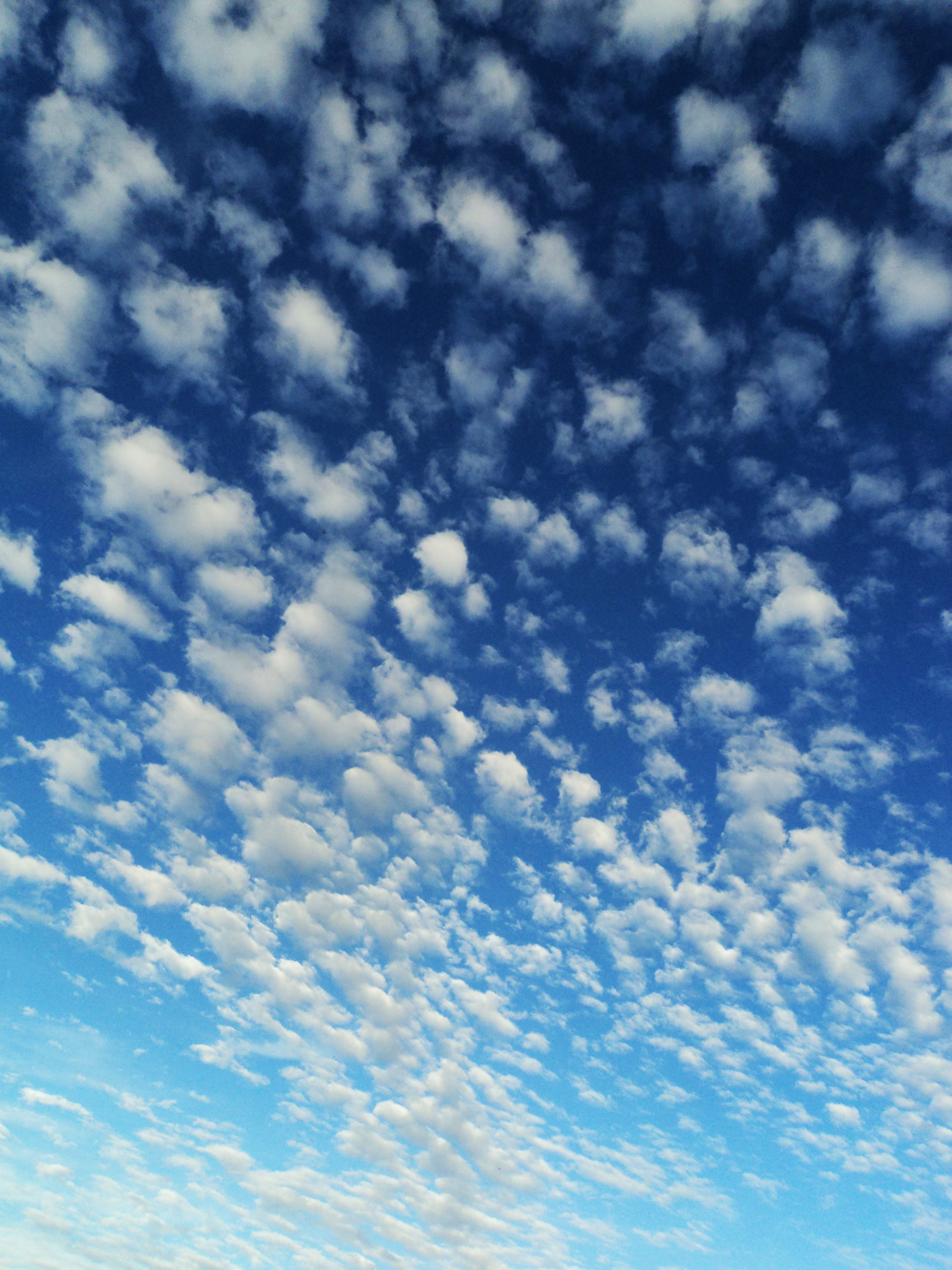 Cielo y nubes